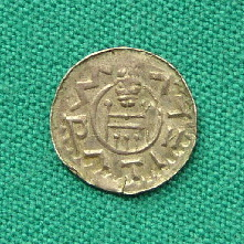 Denár Vratislav II. 2.strana